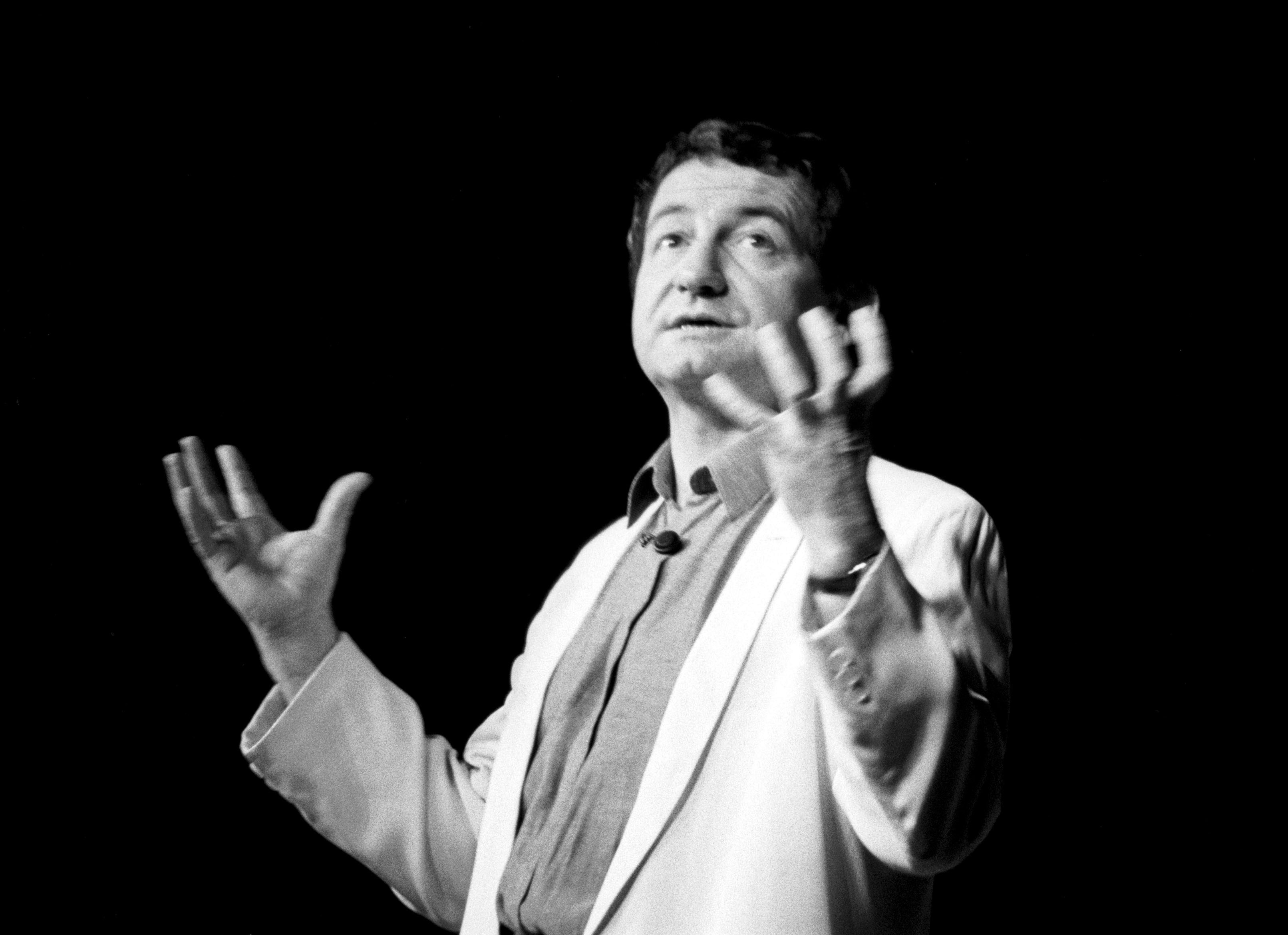 L'humoriste français Pierre Desproges en scène à Morlaix (Bretagne, France) le 26 janvier 1985.